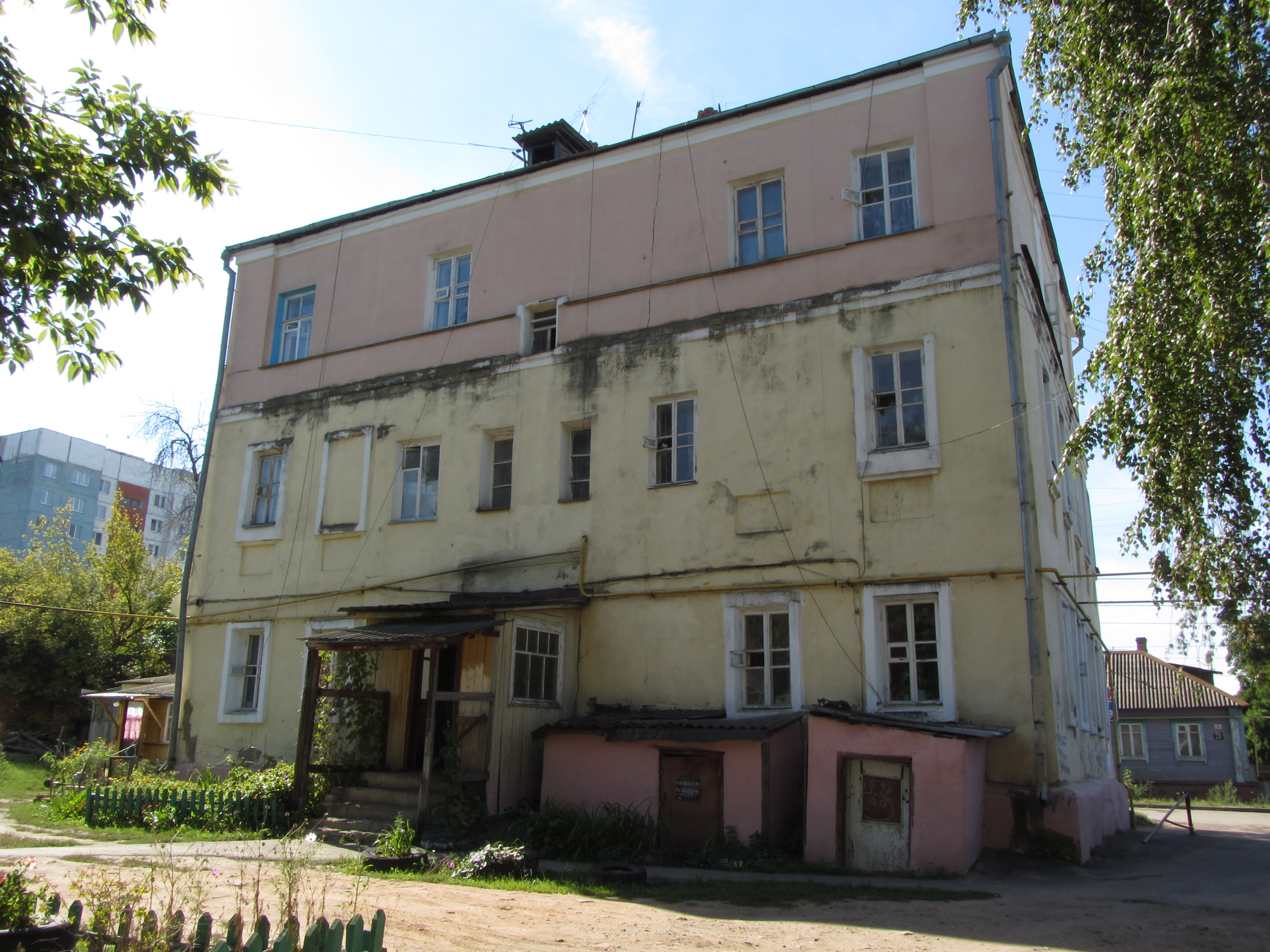 Дом, в котором жил публицист, деятель народнического движения Н.С. Русанов: улица 2-я Курская, 21, Орёл, Орловская область